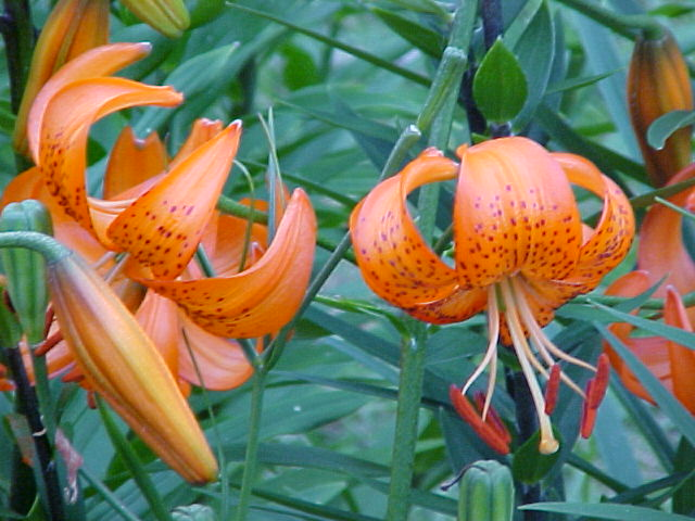 Lilium davidii